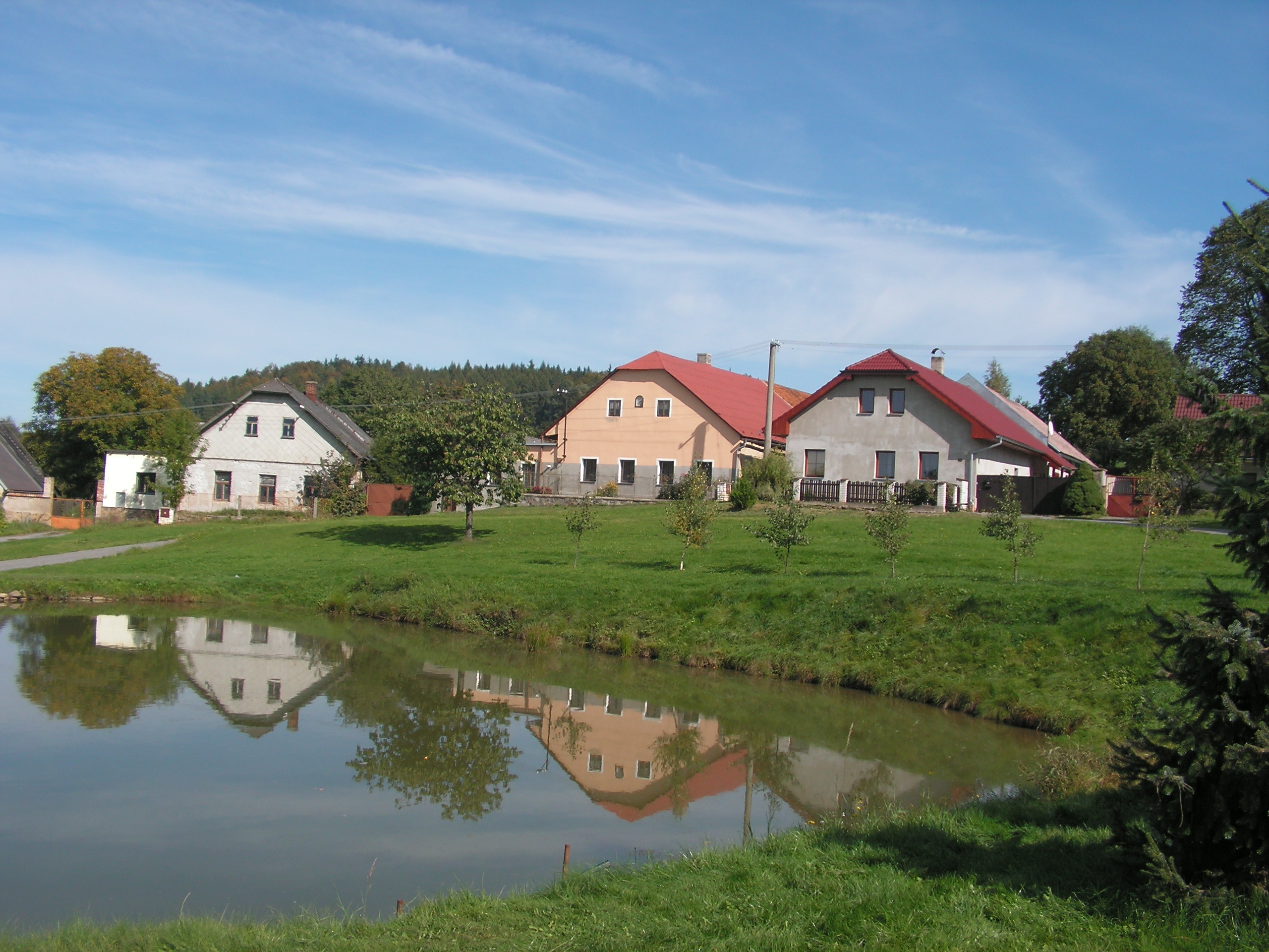 Pohled na rybník v obci Vysoká, která se nachází v okrese Havlíčkův Brod.